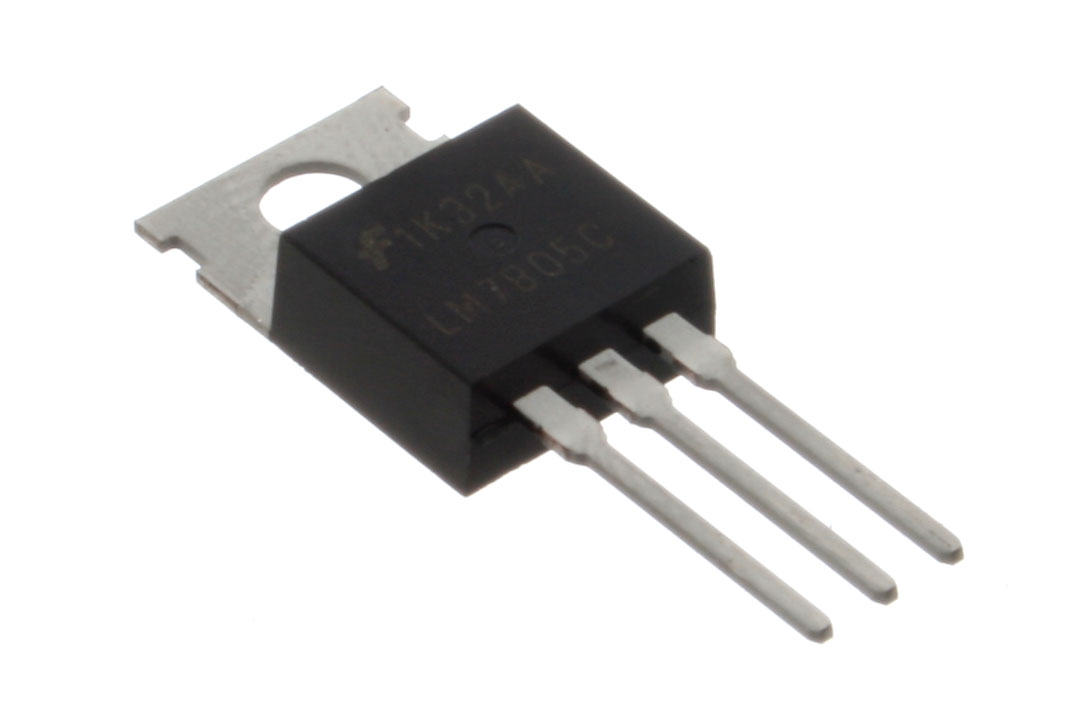 LM7805C 5 Volt Regulator.